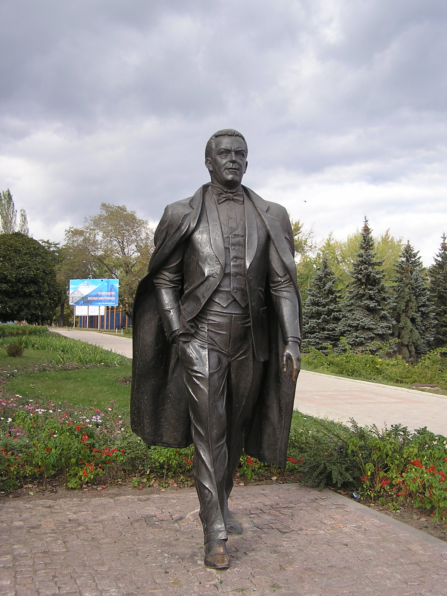 Памятник Иосифу Кобзону в Донецке